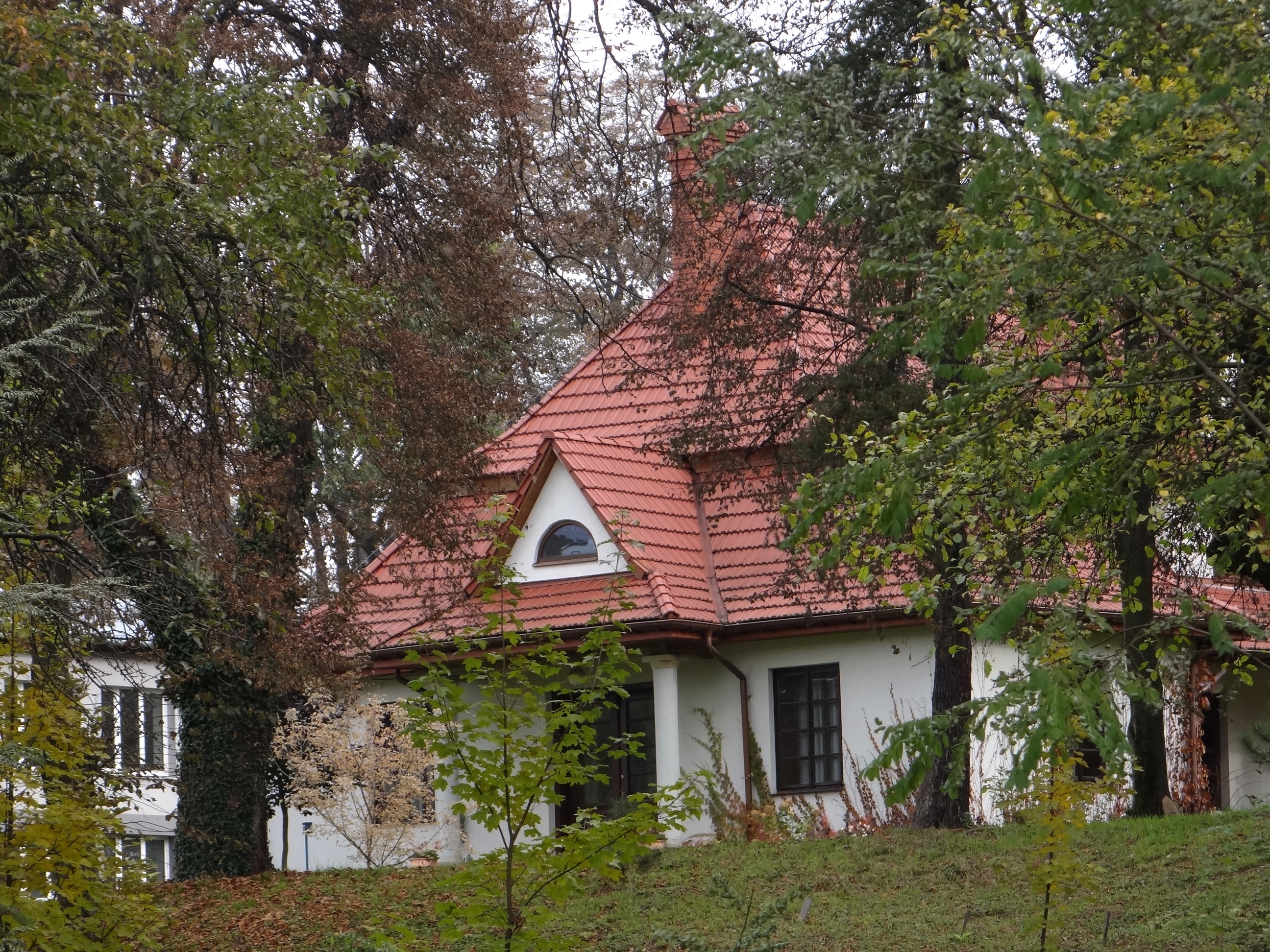 Dawny dwór w Nieprześni